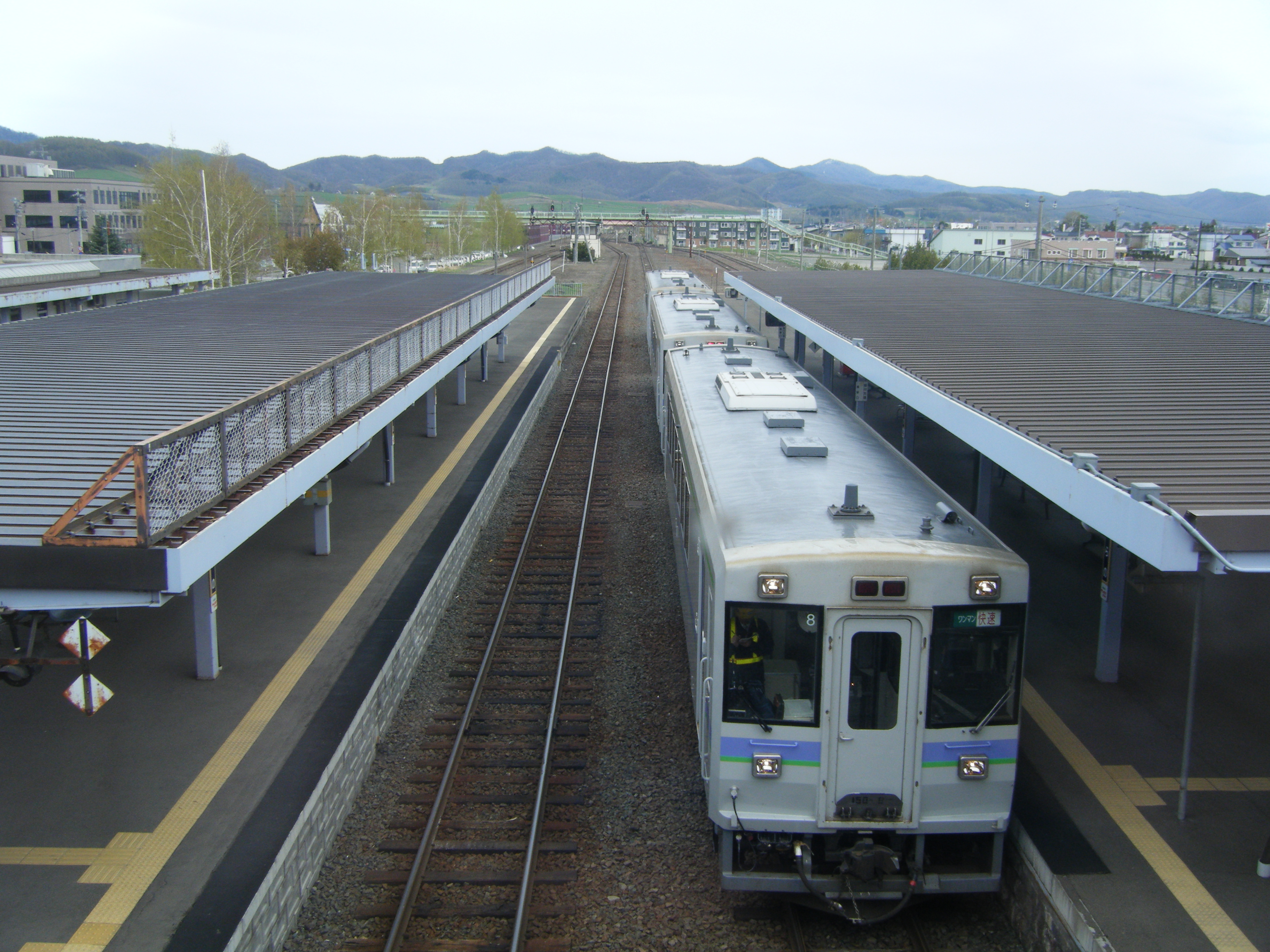 JR北海道：富良野駅構内（快速列車が停車中）。旭川方向に撮影。